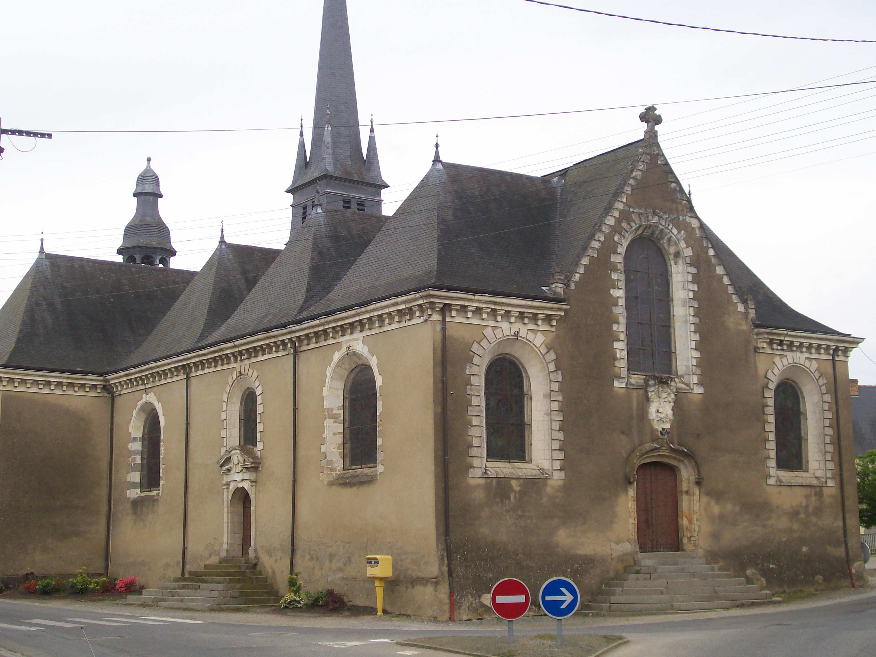 Vue générale de l'entrée Ouest